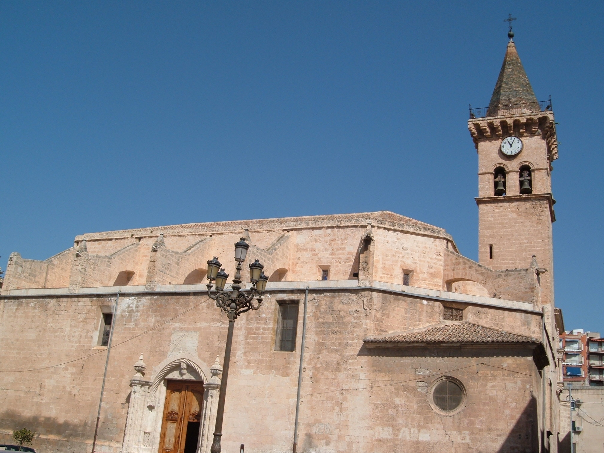 Església parroquial de Sant Jaume Apòstol, a Villena (Alt Vinalopó).